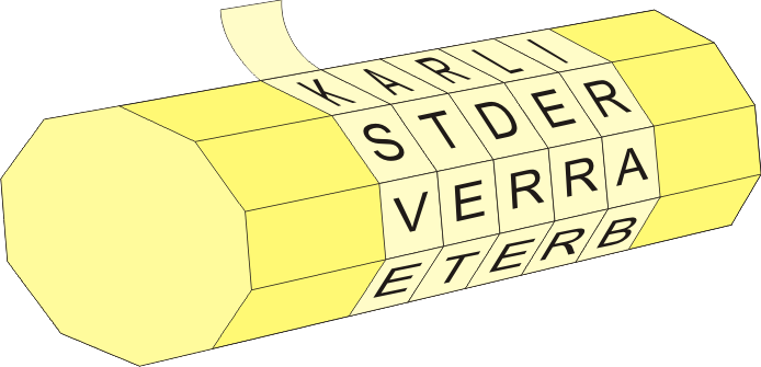 Skytale-Verschlüsselung (Permutationsverschlüsselung)